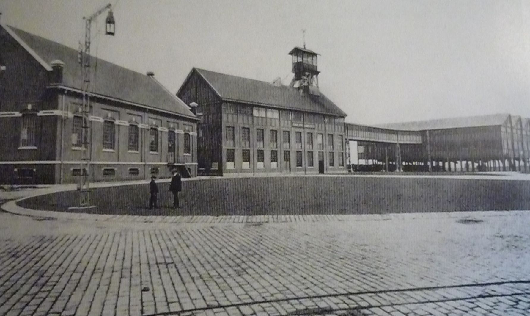 La fosse n° 16 de la Compagnie des mines de Lens était un charbonnage constitué d'un seul puits situé à Loos-en-Gohelle, Pas-de-Calais, Nord-Pas-de-Calais, France.